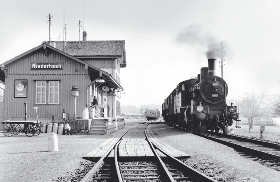 Station Niederhasli, Eb 3/5 5804 mit Vierachsern, 1959.